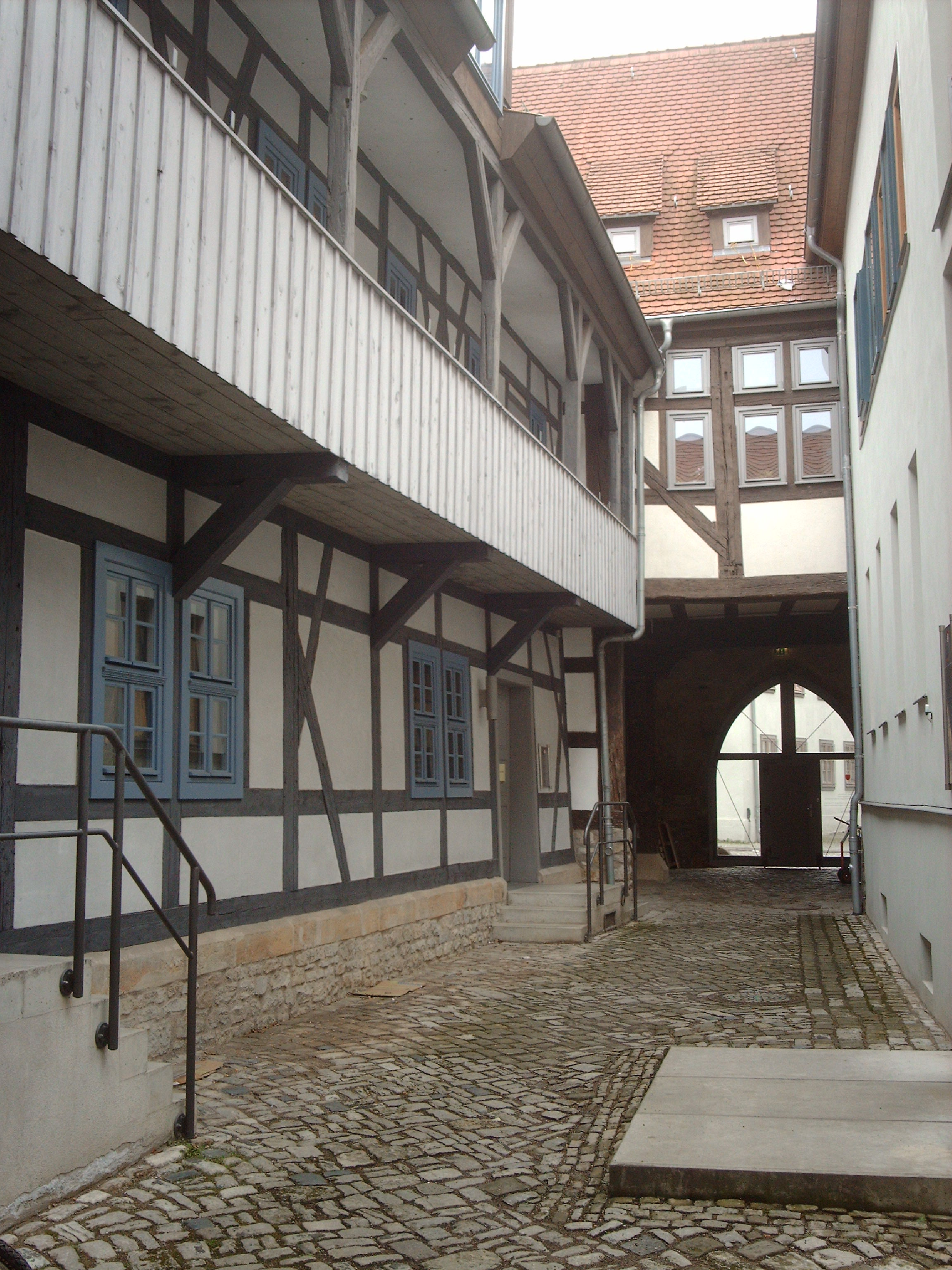 Durchgang beim Haus zum Großen Paradies und Esel in Erfurt.